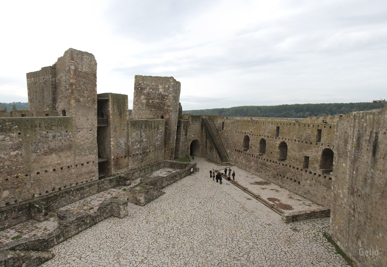 Смедерево, крепость